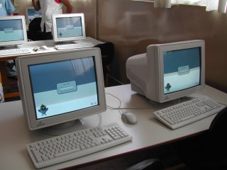 laboratorio.jpg